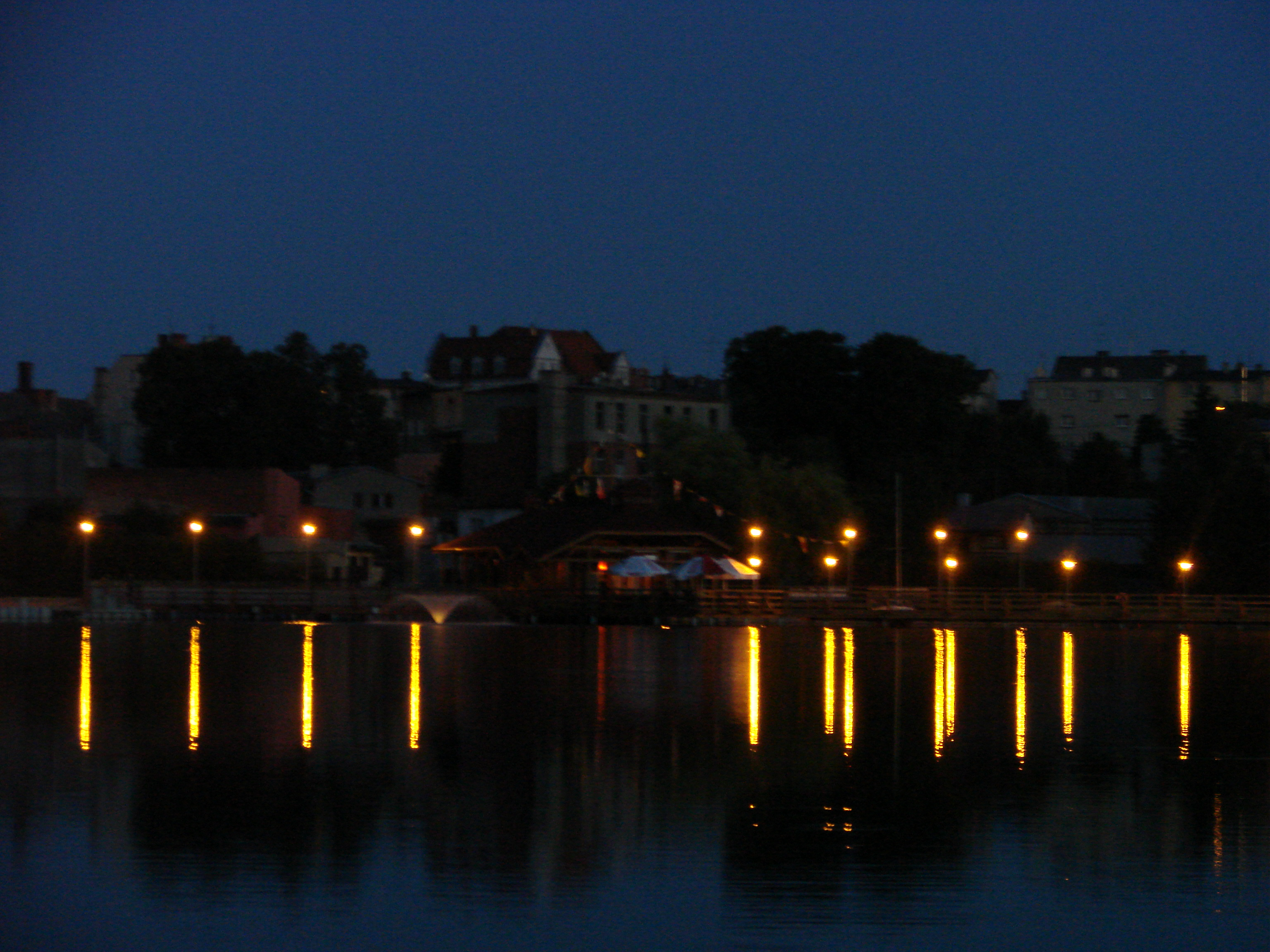 Przystań Żeglarska, Molo Spacerowe, Kawiarnia i Amfiteatr, na Jeziorze Sępoleńskim, w Sępólnie Krajeńskim. Obiect in Sępólno Krajeńskie, on Sępoleńskie Lake. Poland.